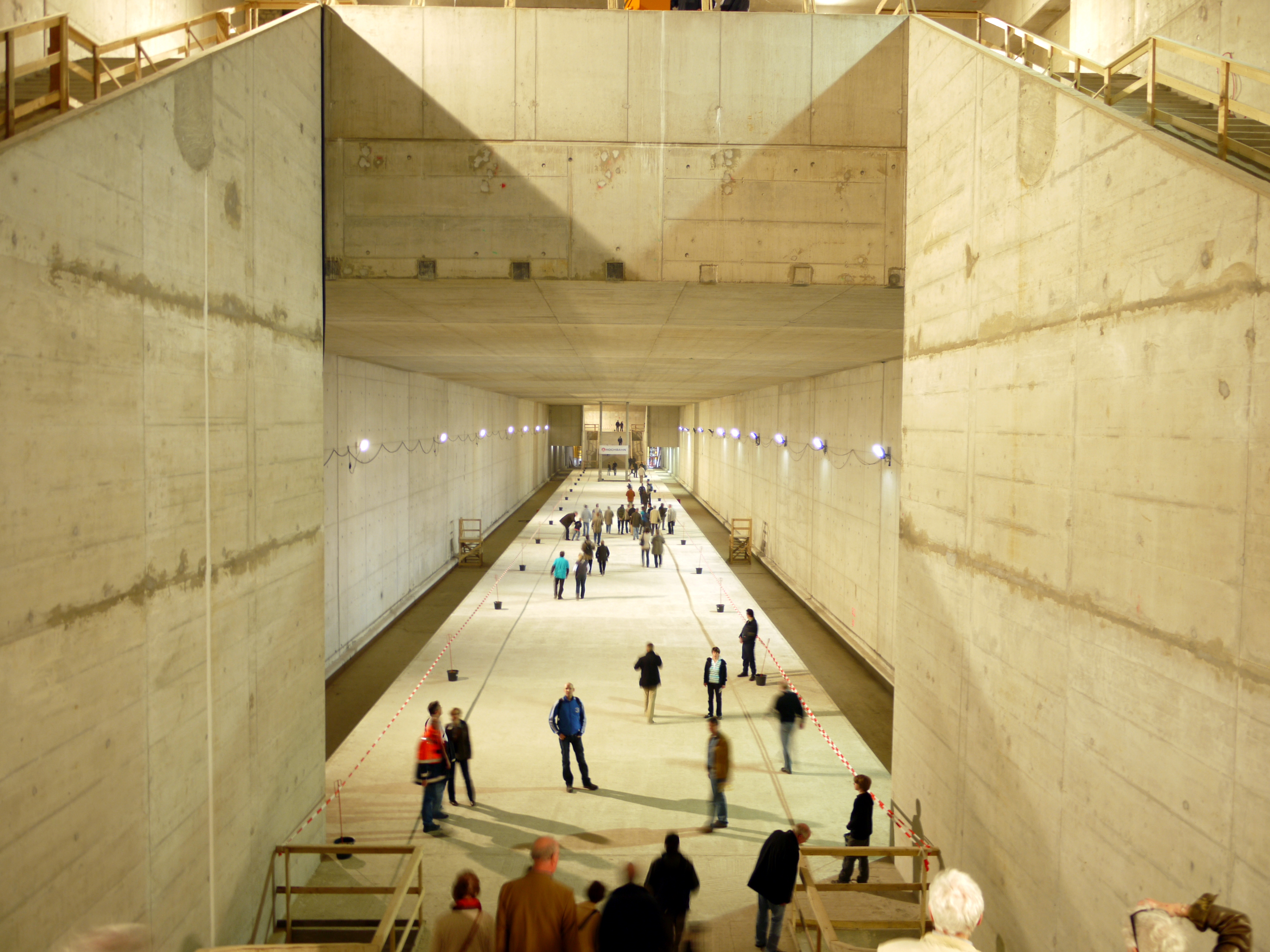 Rohbau der Haltestelle Überseequartier der Hamburger U-Bahn im April 2010.